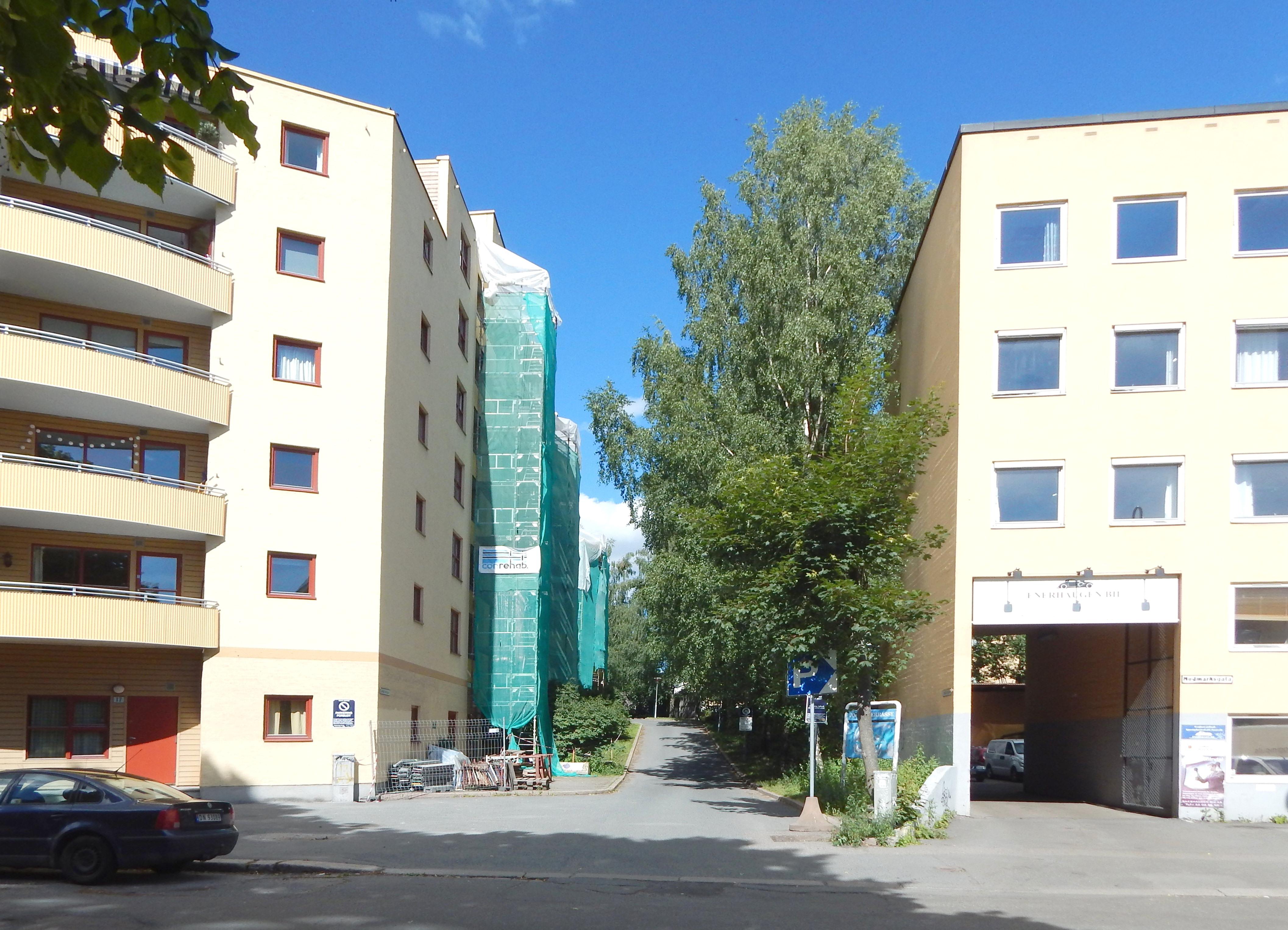 Jordal terrasse